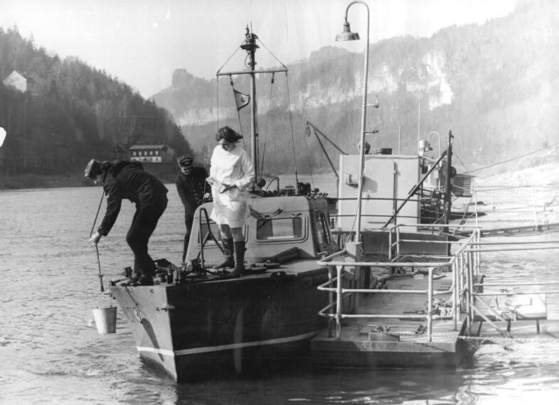 Dresden, Elbe, Entnahme einer Wasserprobe ADN-ZB Häßler 6.3.74 Bez. Dresden: Täglich Untersuchungen des Elbwasser – Täglich untersuchen die Chemieingenieure und -Laborantinnen der Oberflußmeisterei Obere Elbe-Mulde die Beschaffenheit der Elbe. Wolfgang Viehweger und Klaus Frenzel von der Abteilung Gewässeraufsicht sowie die Laborantin Ingrid Pohl entnehmen eine Probe aus der Elbe (Foto). Anschließend wird das Wasser in modern eingerichteten Labors auf organische Belastung sowie Sauerstoff-, Phenol- und Salzgehalt getestet. Kontinuierlich alle 14 Tage nehmen auch Experten aus der benachbarten CSSR an dieser Untersuchung teil.